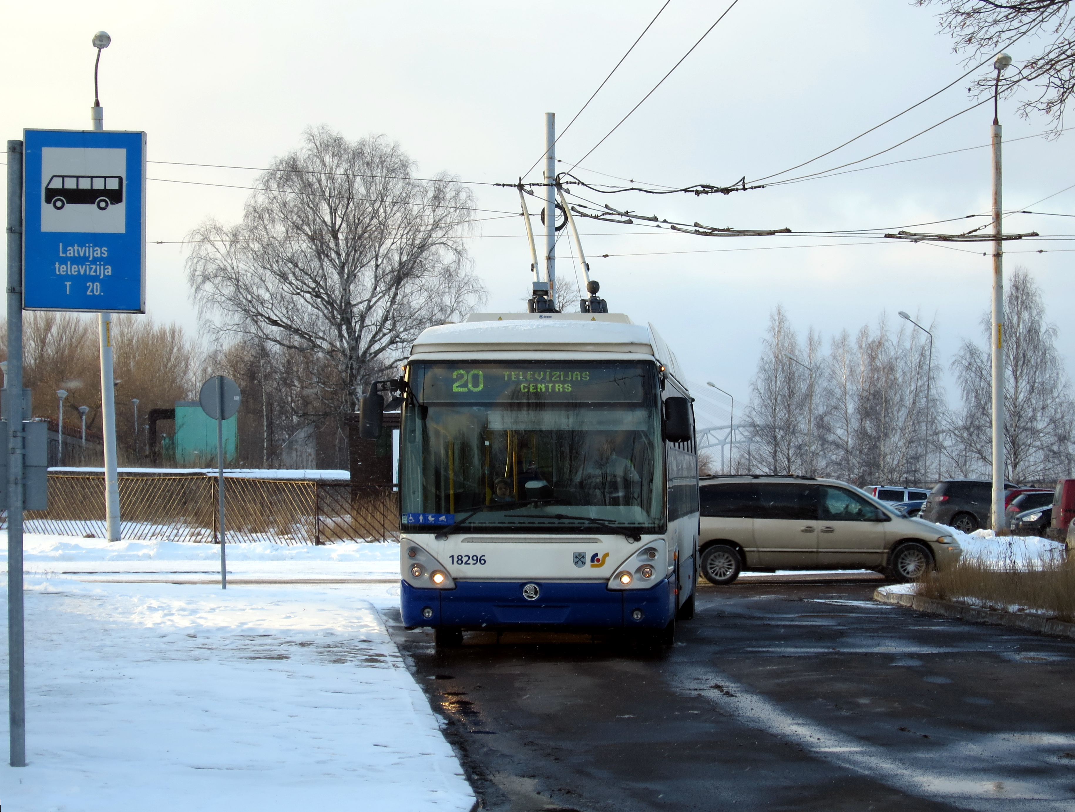 20. maršruta trolejbuss galapunktā Zaķusalā